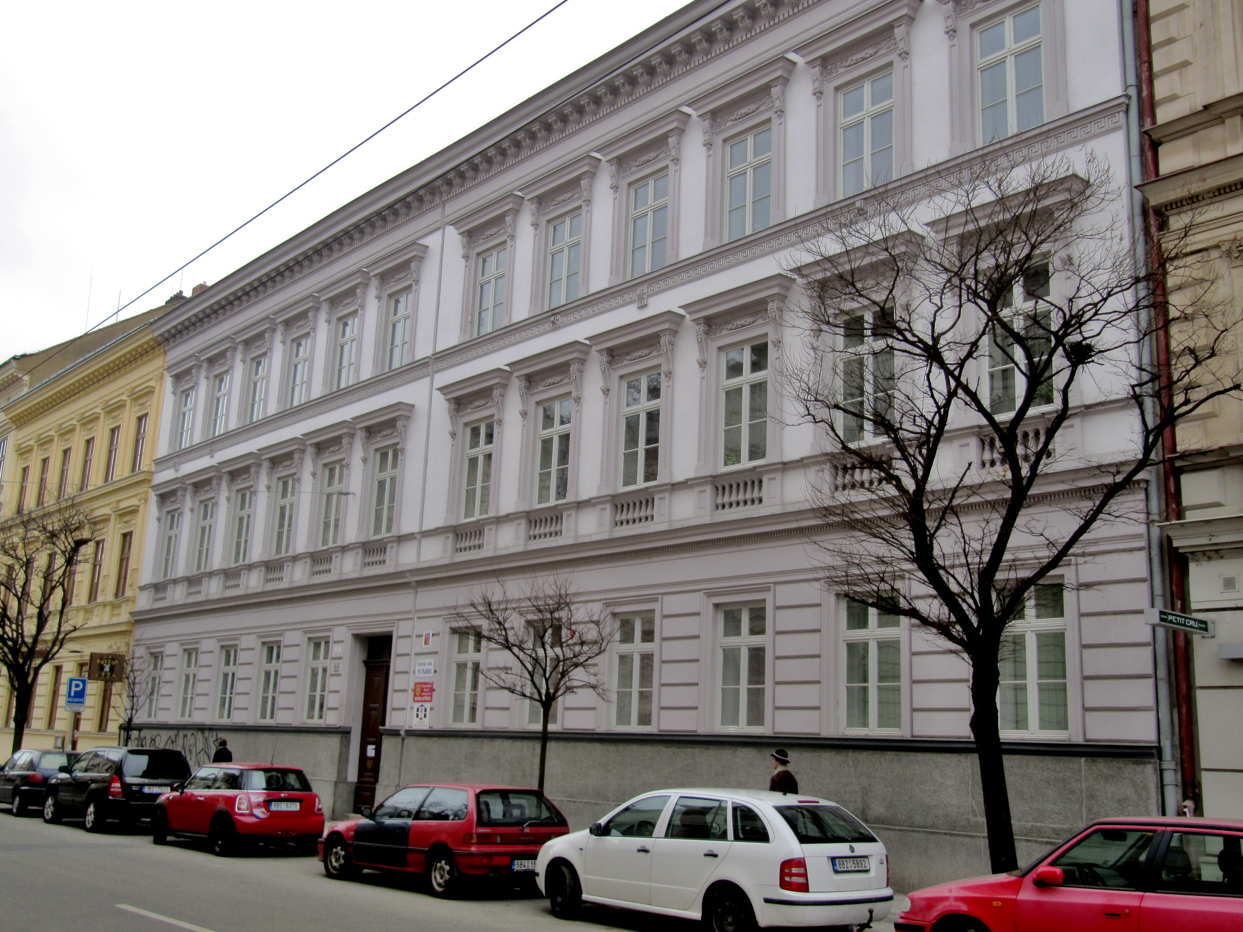 Brno, Údolní 9